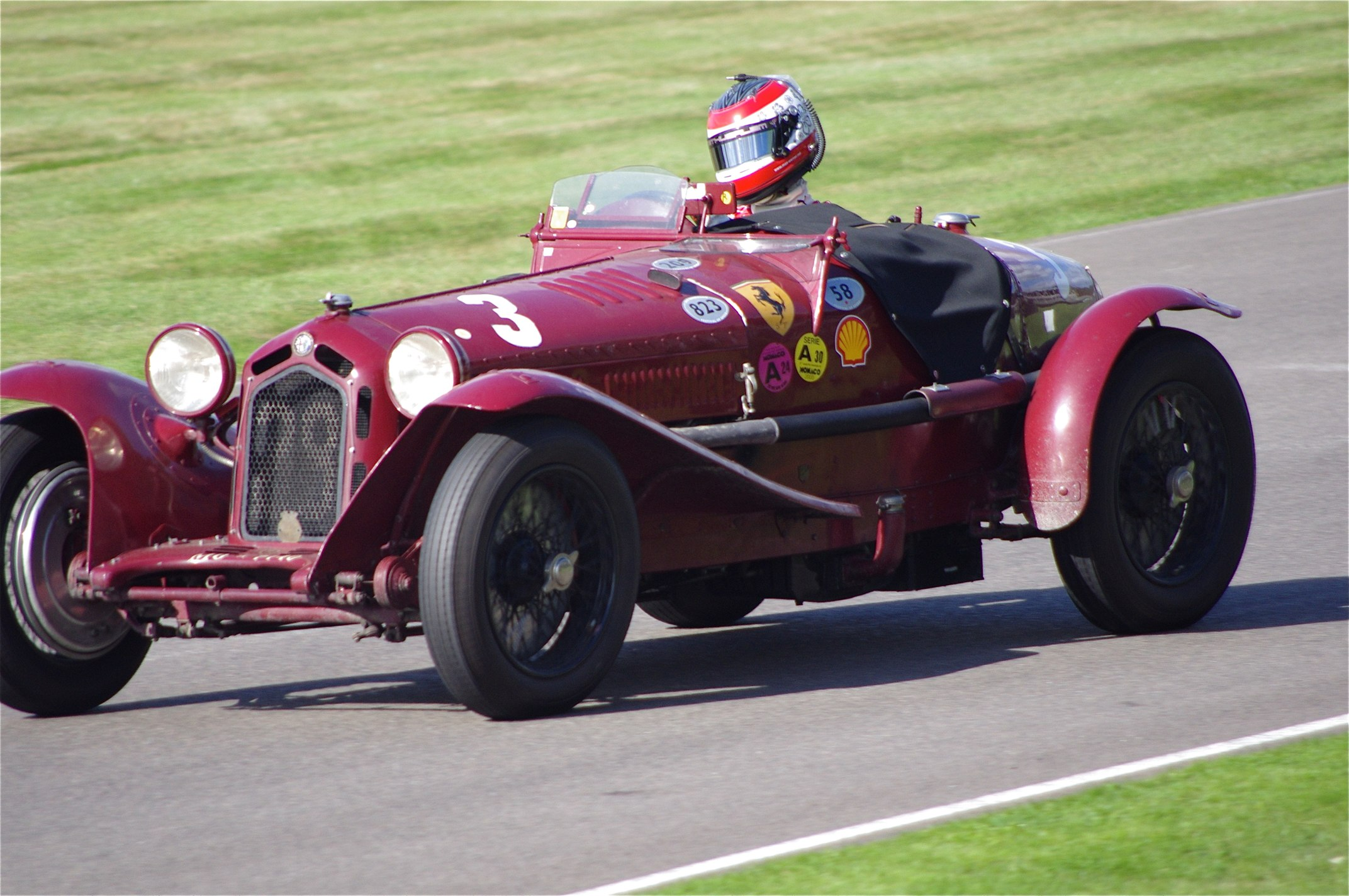 Goodwood Revival 2012